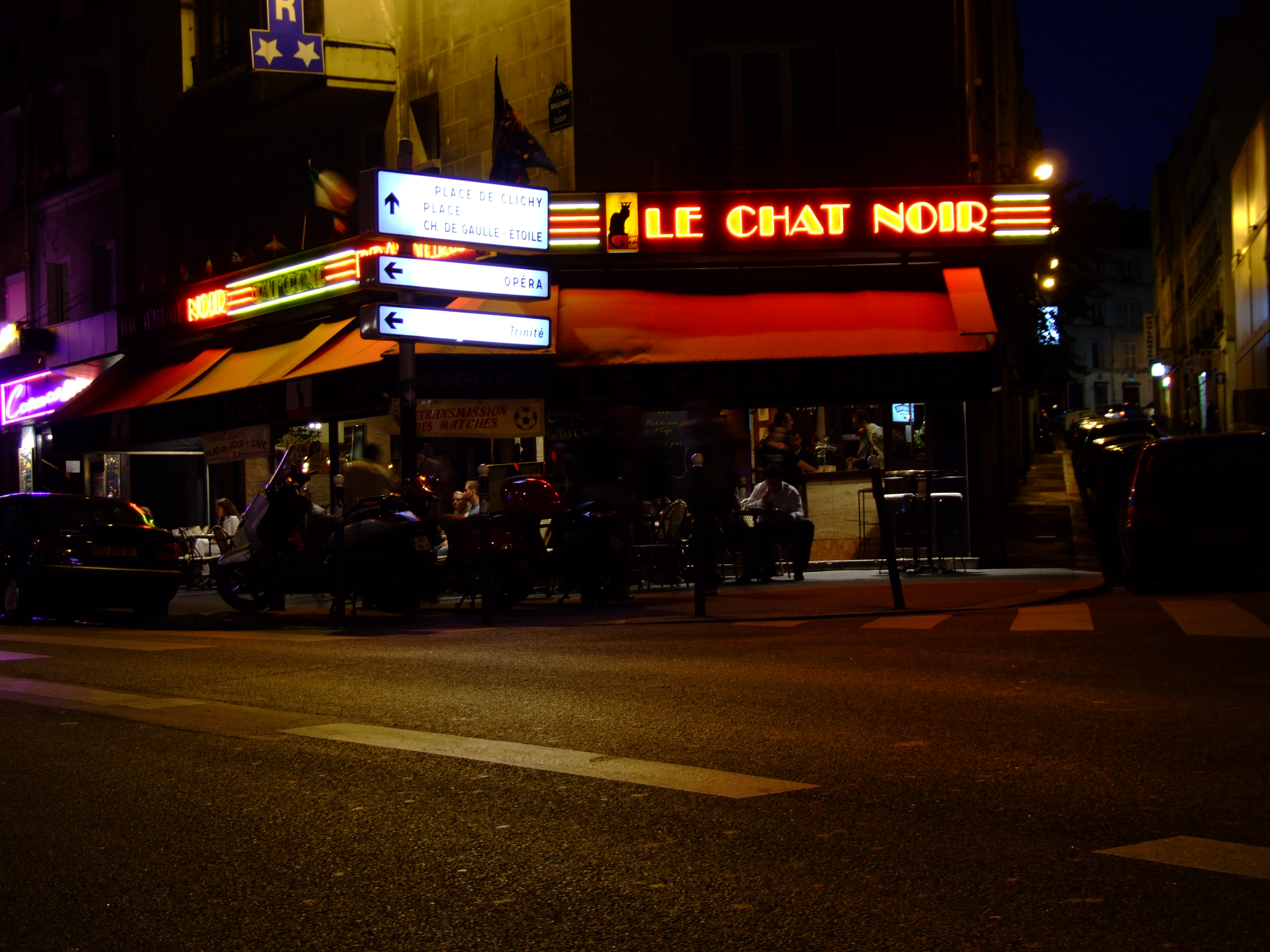 Le Chat Noir, 68 Boulevard de Clichy, Paris, France